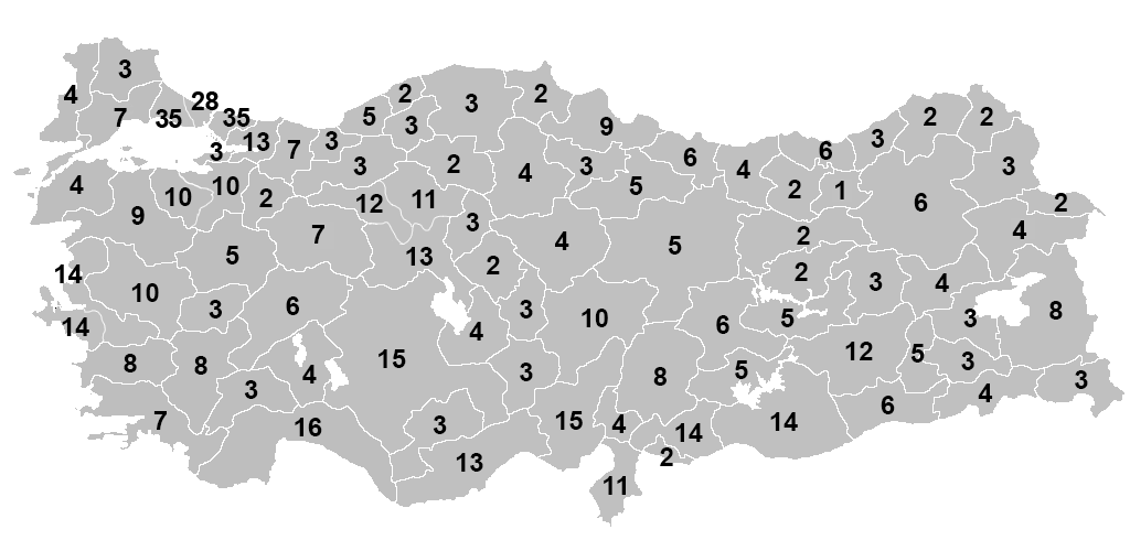 600 Milletvekilli yeni sisteme göre il il milletvekili sayısı dağılımı